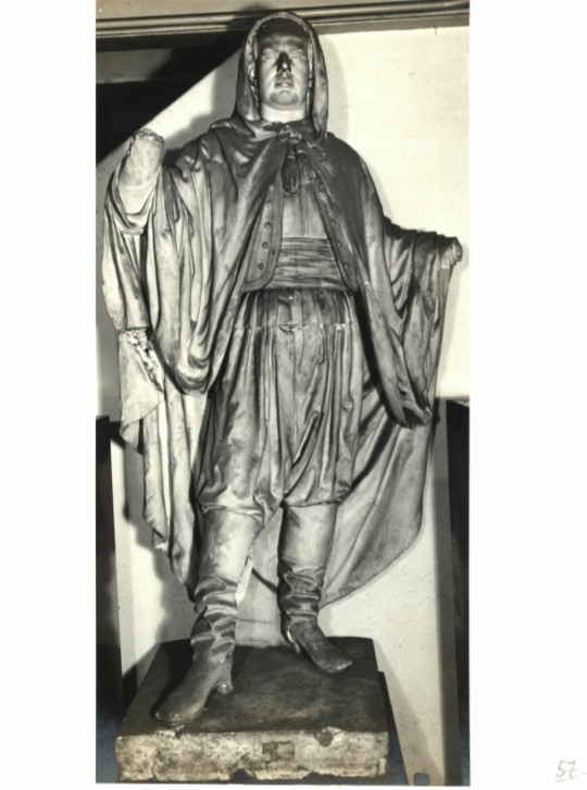 Estátua do ator Joaquim Augusto Ribeiro de Souza no drama "O Africano", obra do Professor Francisco Manuel Chaves Pinheiro. Figurou na Exposição Geral de 1875. Foi oferecida à Academia Imperial de Belas Artes em 1875 pela viúva do ator, a atriz D. Maria Velluti Ribeiro de Souza. Sua localização atual é desconhecida. A imagem é de 1976 e faz parte do acervo do Museu D. João VI/EBA/UFRJ.